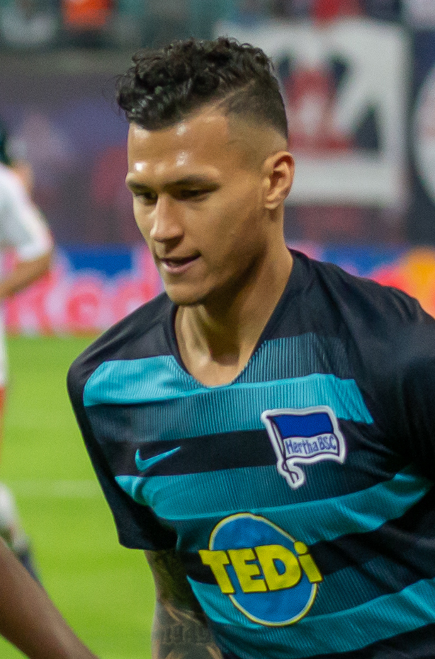 Fußball, Männer, 1. Bundesliga, RB Leipzig - Hertha BSC; Davie Selke (Hertha BSC, 27)